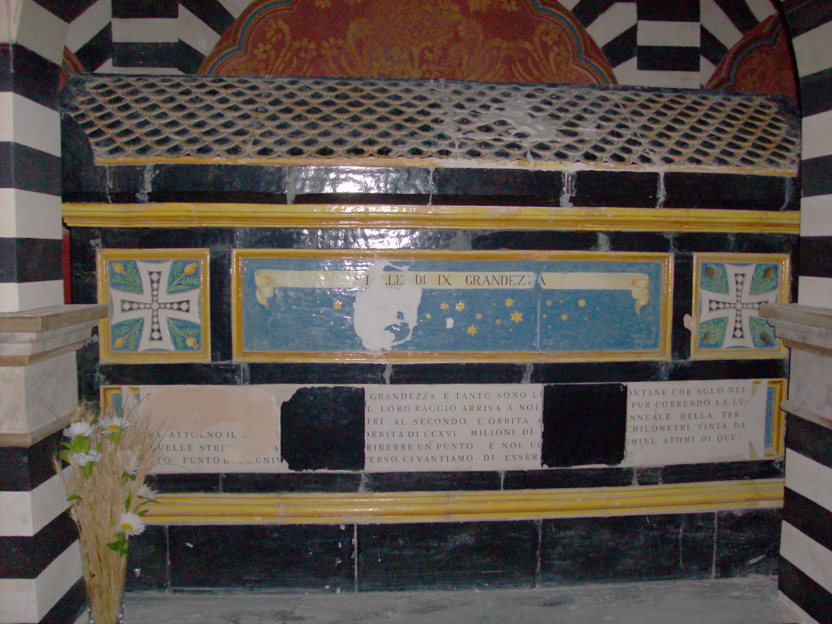 Rocchetta Mattei